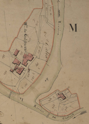 La Farga de Galdares, a Serrallonga, en el Cadastre napoleònic del 1812 (Arxius Departamentals dels Pirineus Orientals)